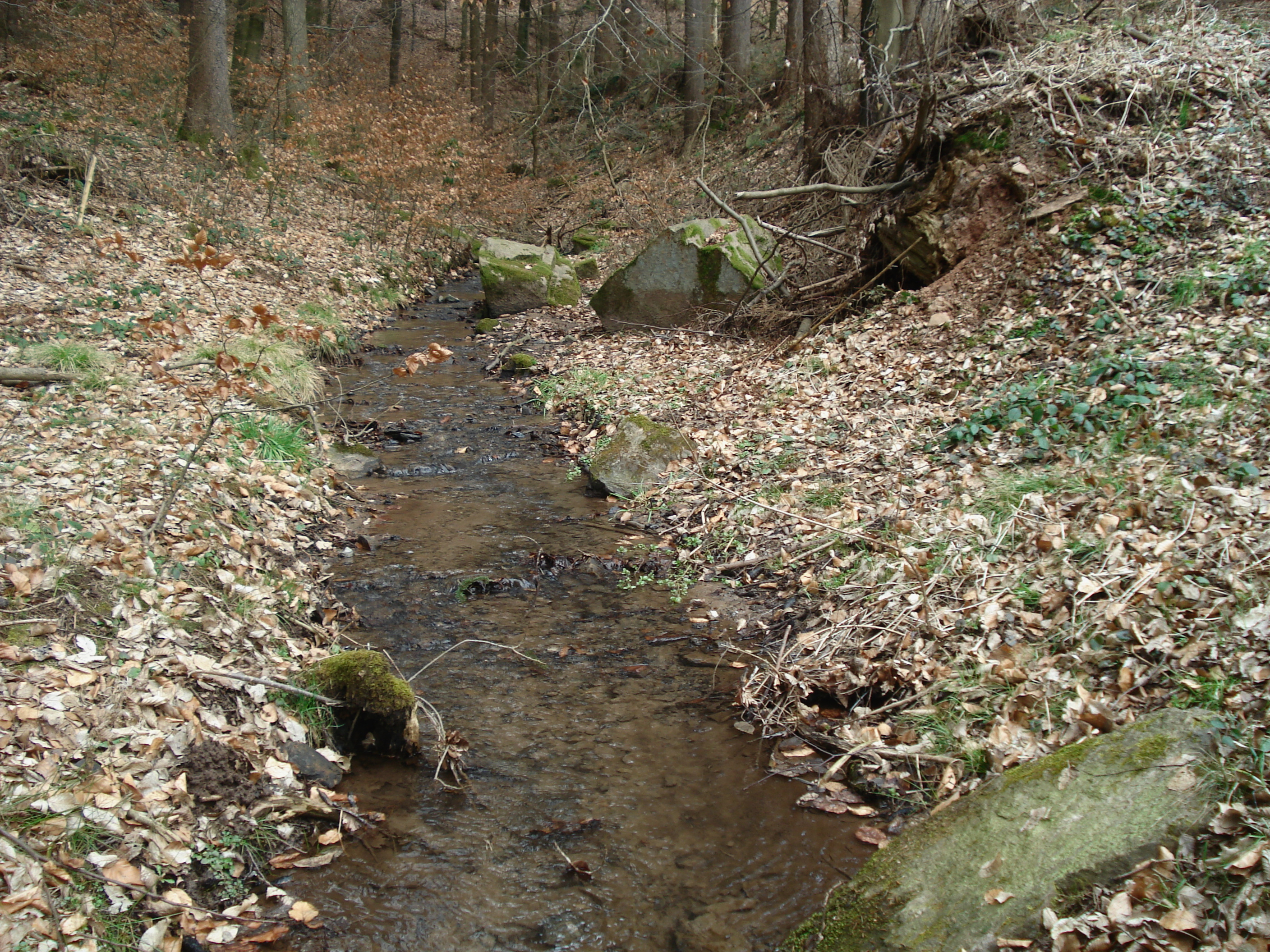 Der Blankenbach oberhalb von Kleinblankenbach